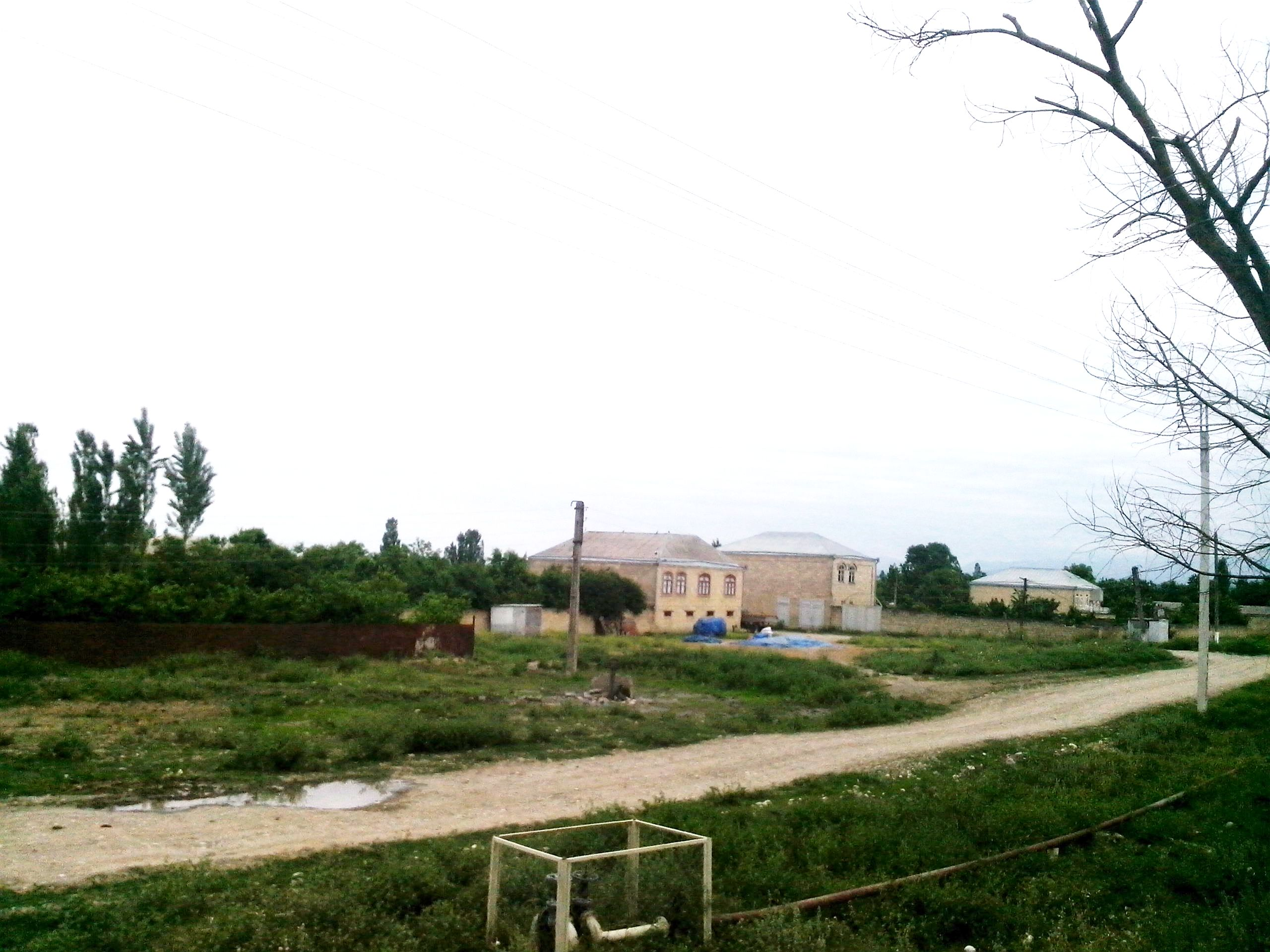 Aşağı Atuc, Quba